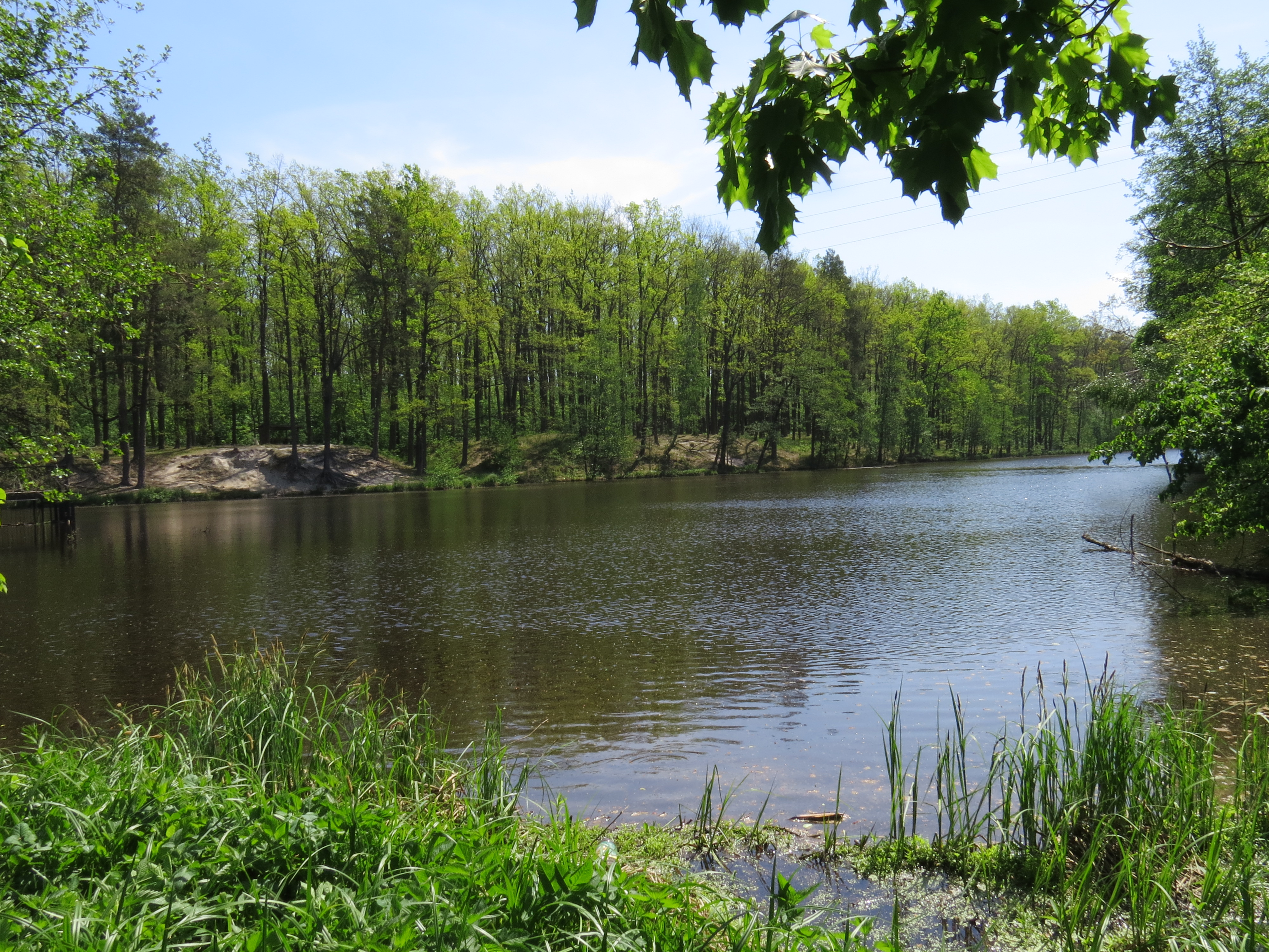 Пам'ятка природи «Урочище Бабка» біля с. Пороскотень Бородянського р-ну Київської обл. Ставок з рибальським господарством на р. Стрижень. На тому березі починається урочище. Зйомка від шосе Макарів — Клавдієво-Тарасове.